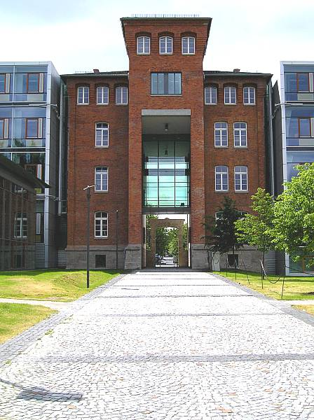 Durchgang im Justizzentrum Meiningen